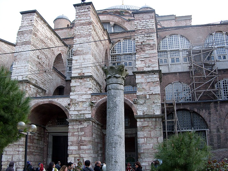 Istanbul - Basilica di S. Sofia